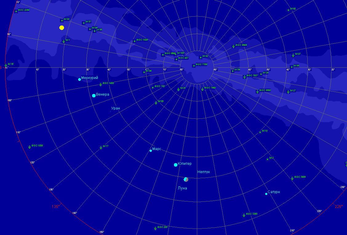 Парад планет июня 2022 года, вид из средних широт (55 с. ш.)